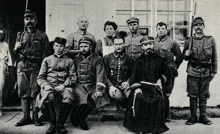 Grupa internowanych legionistów w Hurzt.